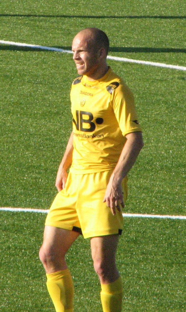 Vegard_Sannes(Glimt) under oppstillingen til BOdø/Glimt-Sogndal.